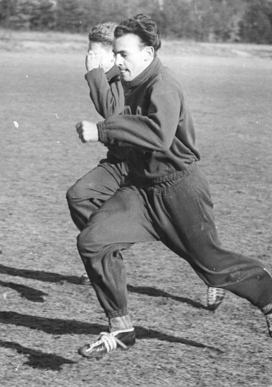 Zentralbild-Beyer Bey-Sch. 23.3.56 DDR-Jugendauswahl für FIFA-Jugendturnier - In der Zeit vom 28. März bis zum 2. April 1956 findet in der ungarischen Hauptstadt Budapest das FIFA-Jugendturnier statt. Die DDR-Auswahlmannschaft wurde in den letzten Tagen in der Sportschule Strausberg zusammengezogen und bereitet sich unter der bewährten Leitung der beiden Trainer Belger und Böning auf die kommende Aufgabe vor. UBz.: Kurze Sprints gehören mit zum Trainingsprogramm. Ein Wettbewerb in verschiedenen Disziplinen (mit Preisen) ist ein weiterer Anreiz. Wir erkennen Harald Fritzsche (Motor Jena) - vorn- und Albrecht Strohmeyer (Lok Stendal) -halb verdeckt- beim kraftvollen Endspurt.